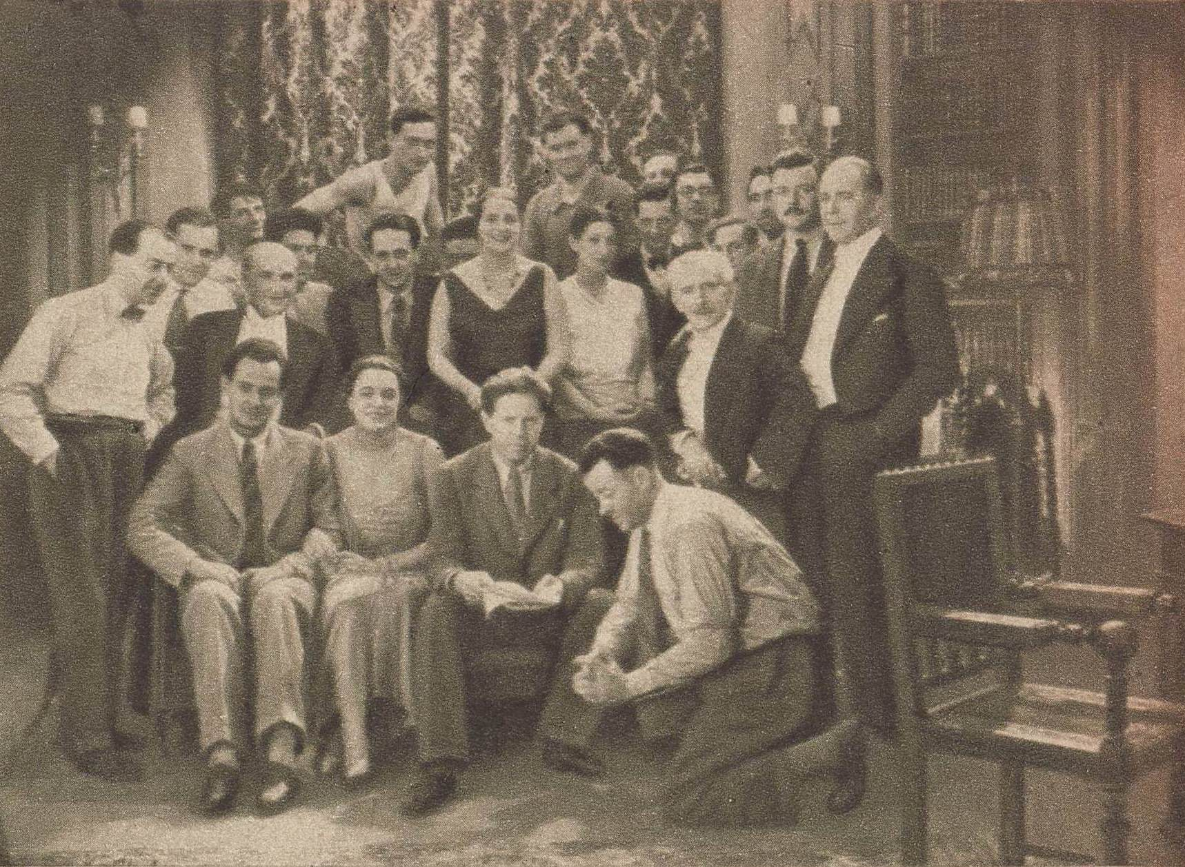 Aktorzy filmu Tajemnica lekarza (1930): Maria Gorczyńska, Halina Bruczówna, Ludwik Solski, Ryszard Ordyński, Kazimierz Junosza-Stępowski, Paweł Owerłło i Zbigniew Sawan